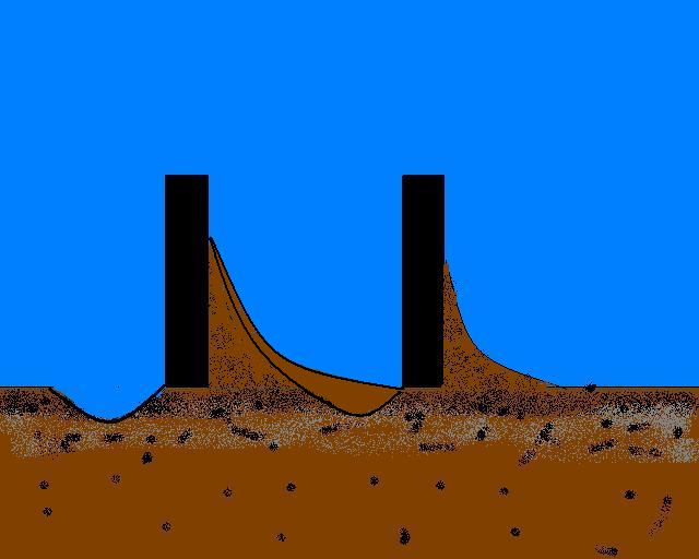 凸堤效應步驟四